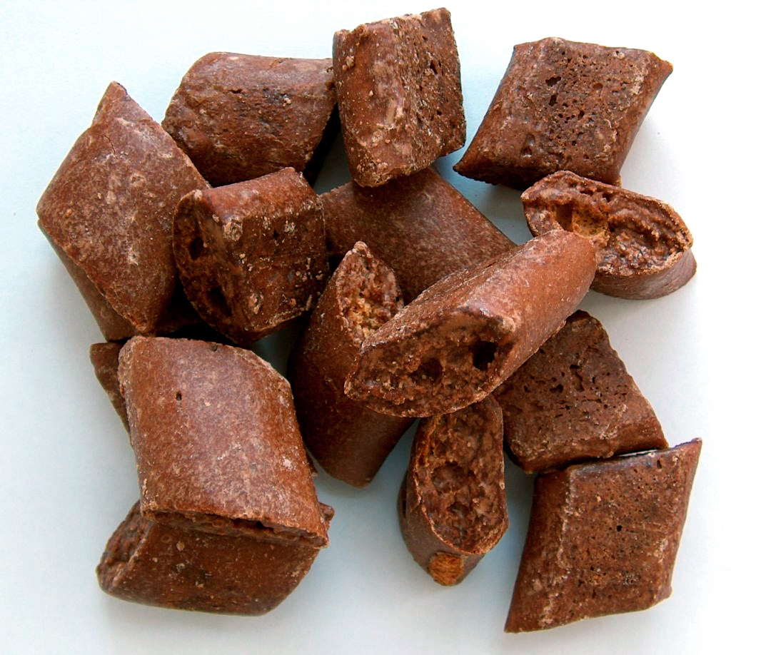 Magenbrot